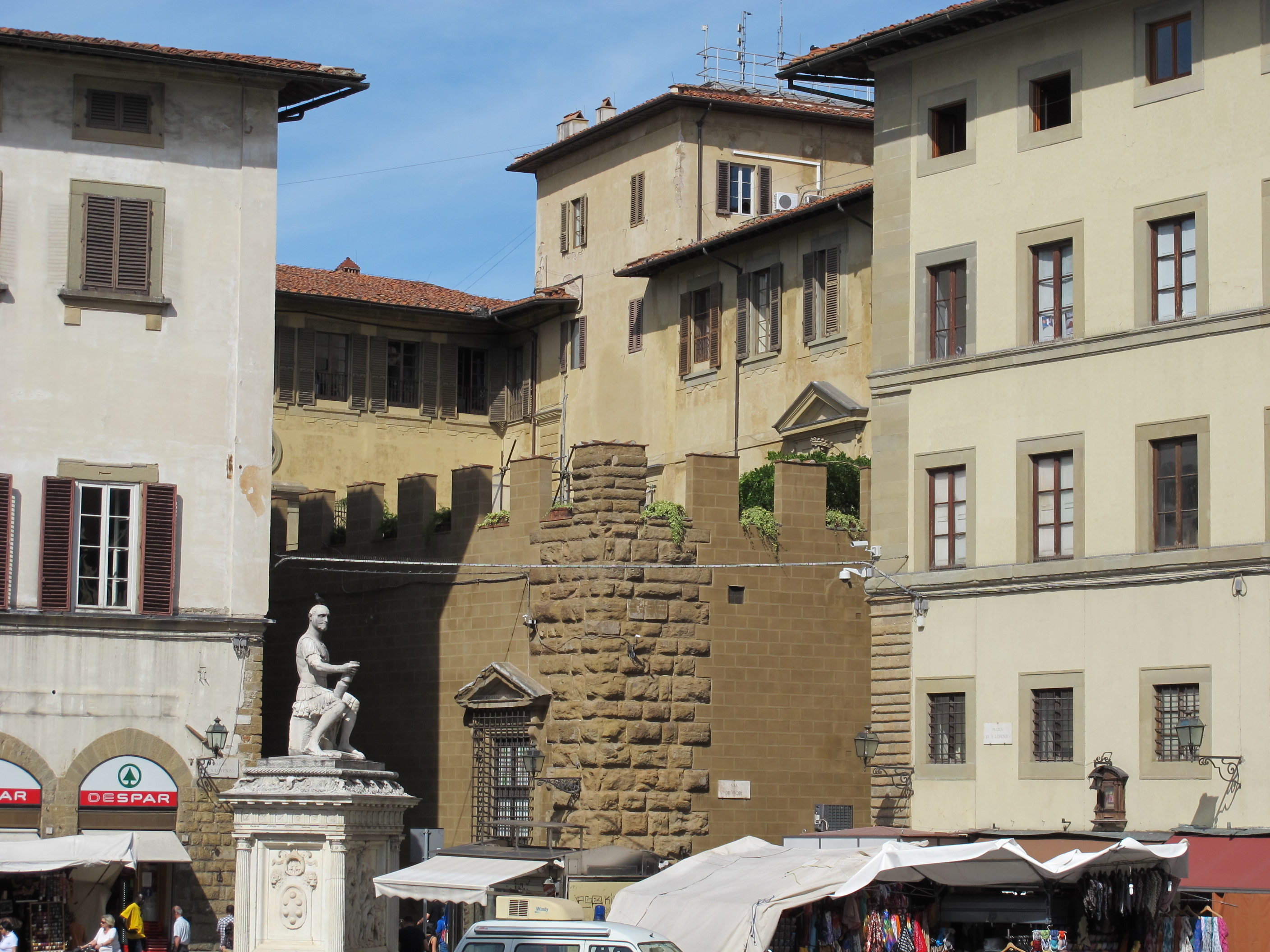 Piazza san lorenzo da ingresso chiostro